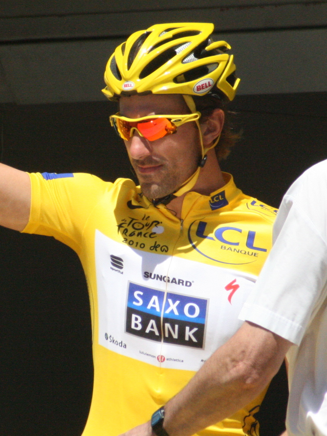 Départ de la 4e étape du Tour de France à Cambrai - Fabian Cancellara